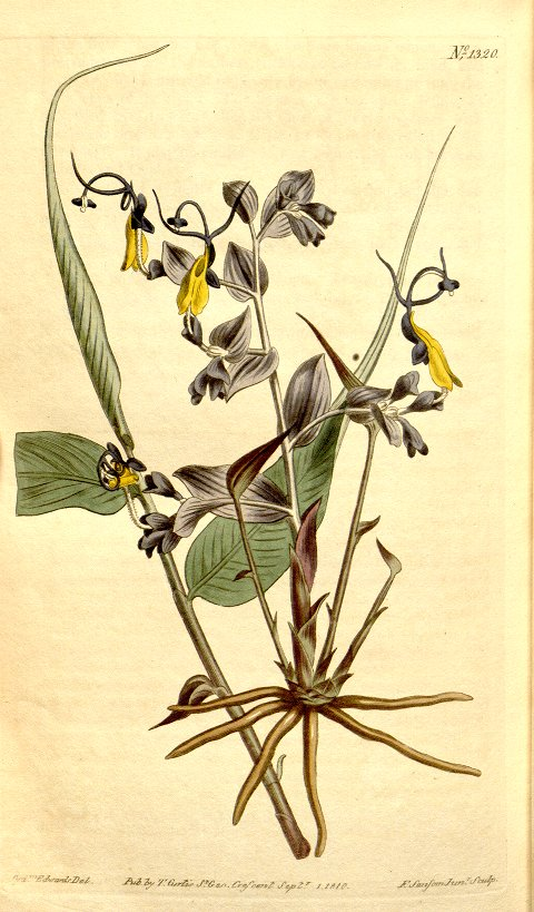 Globba radicalis Roxb. Planche 1320 du Curtis's Botanical Magazine Vol 32 année 1810 sous le nom de Mantisia salvatoria